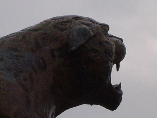 Monumento aos Bandeirantes, instalado no acesso ao Centro Histórico de Santana de Parnaíba SP - onça